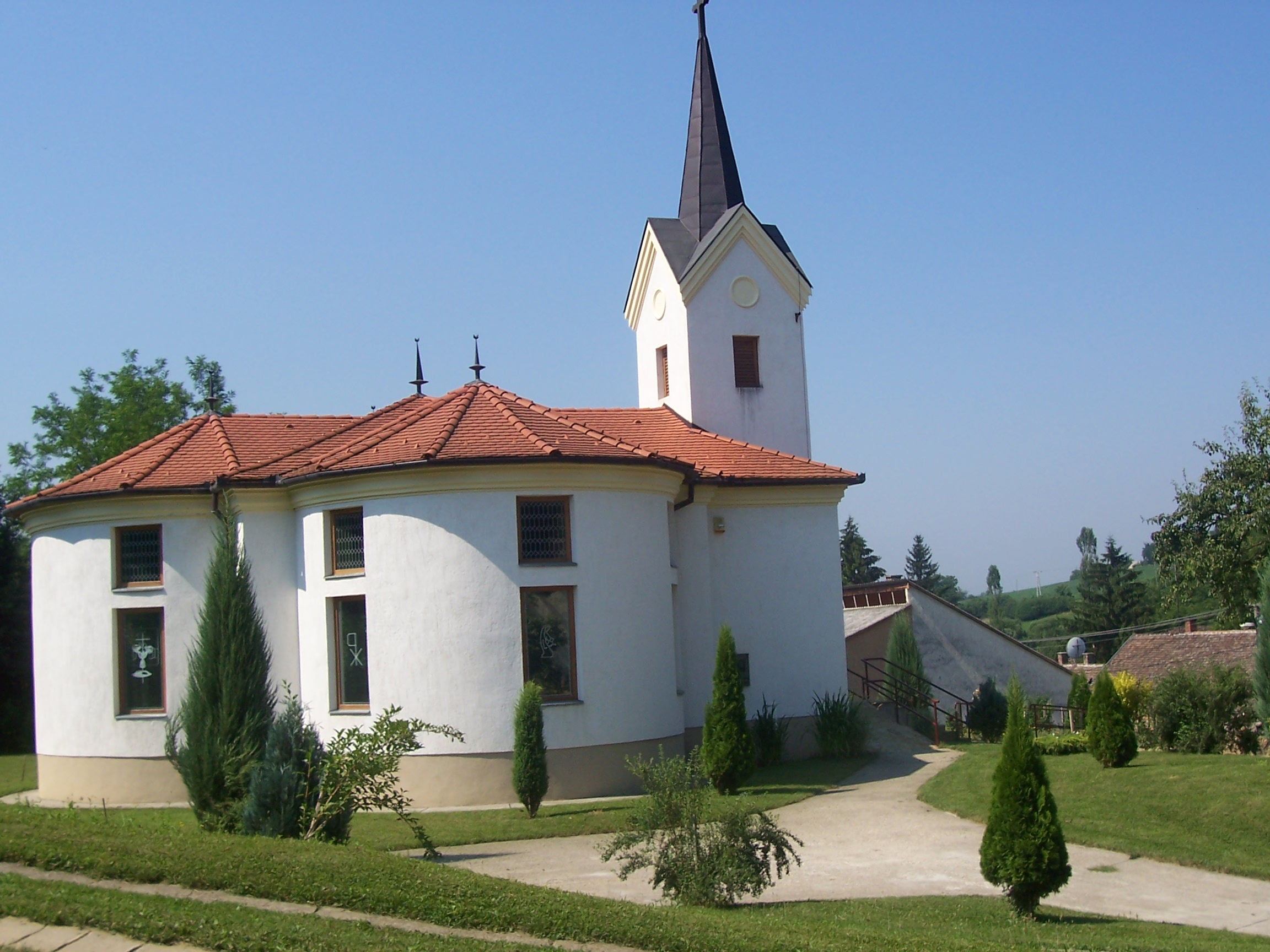 Felsőegerszeg, Kisboldogasszony-kápolna